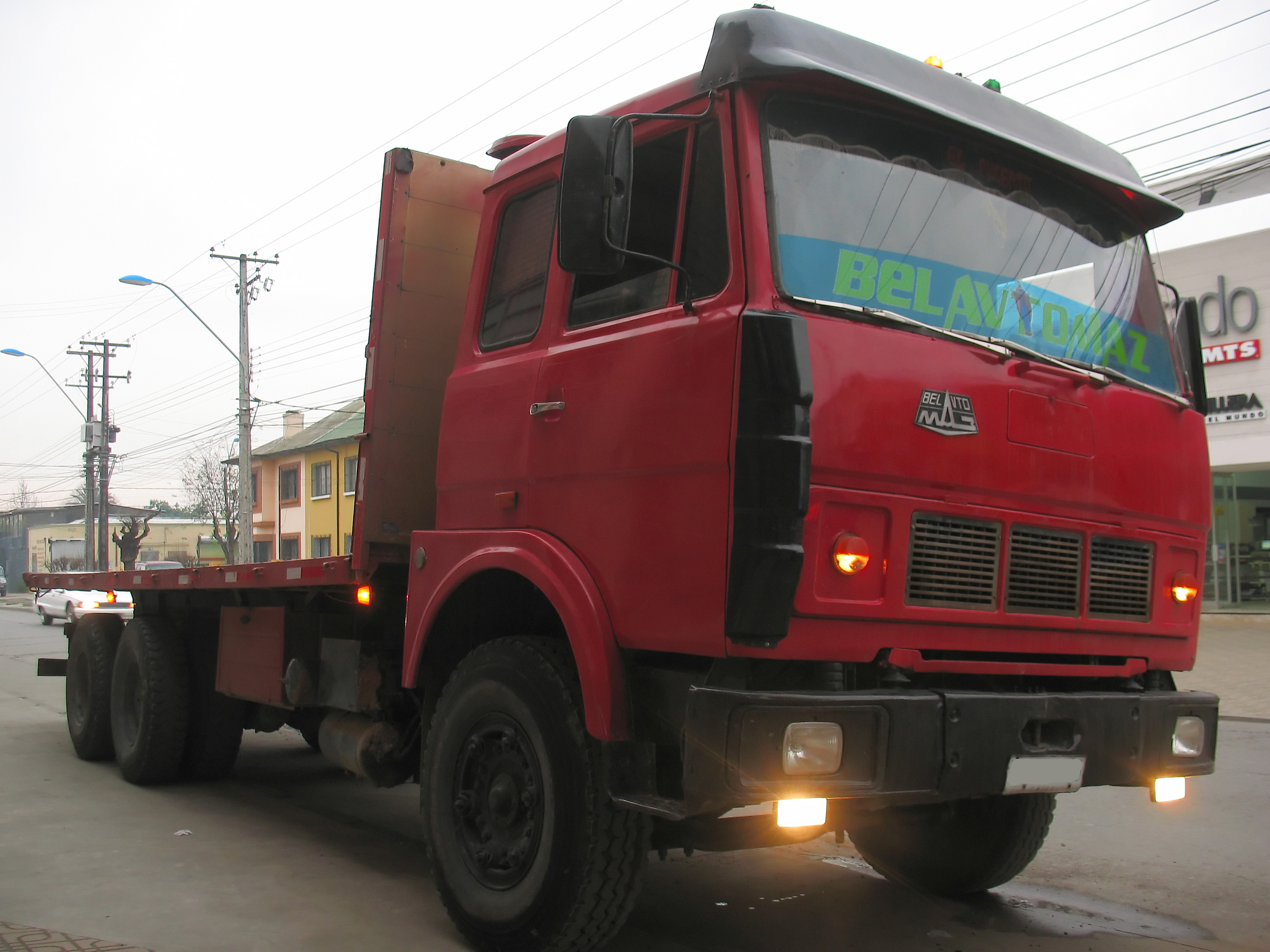 MAZ 6303, 1992